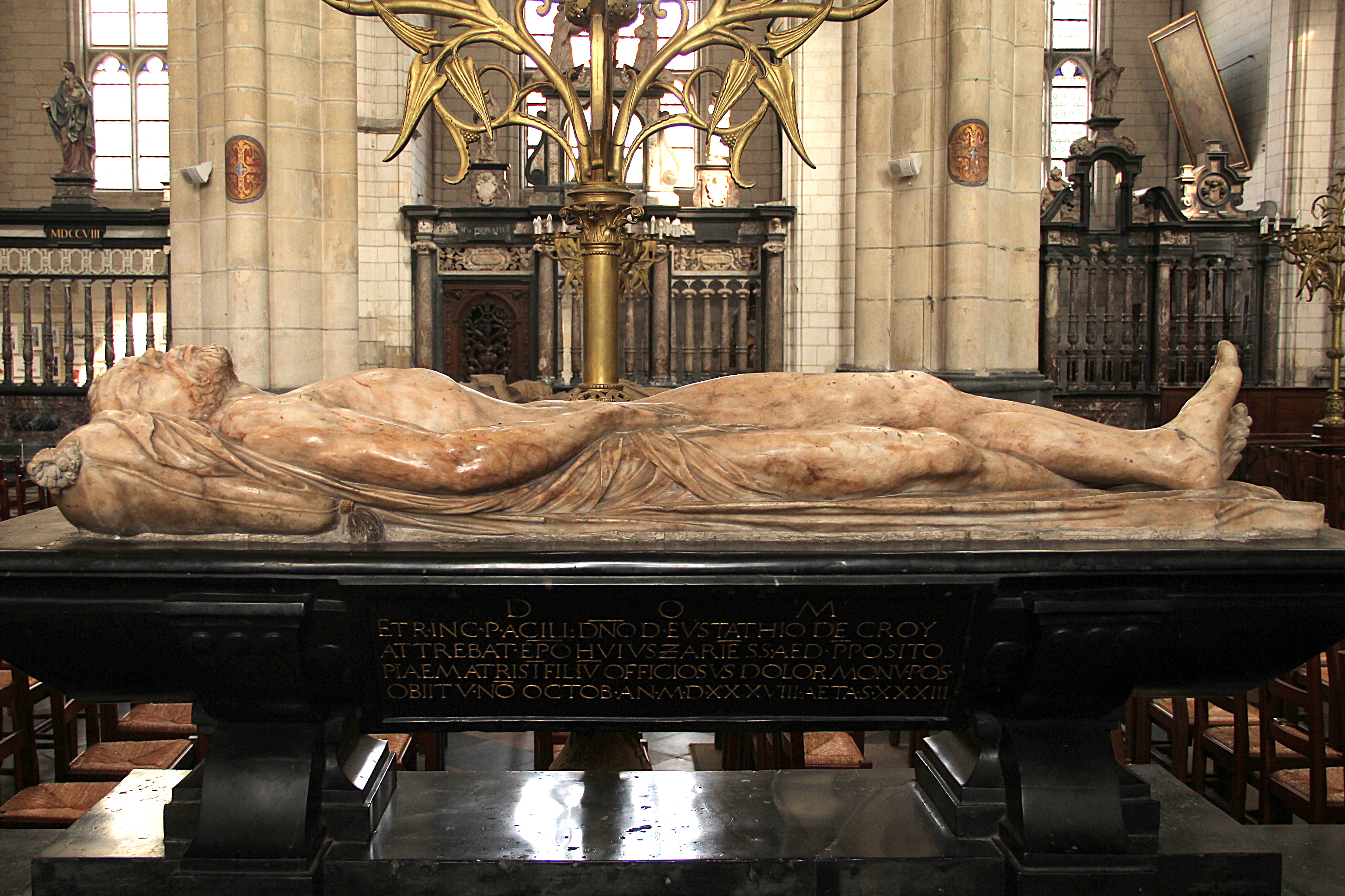 Gisant en albâtre et tombeau en marbre noir d' Eustache de Croÿ (évêque d'Arras) par Jacques Du Brœucq (1540) - Cathédrale Notre-Dame de Sait-Omer (Pas-de-Calais, France).